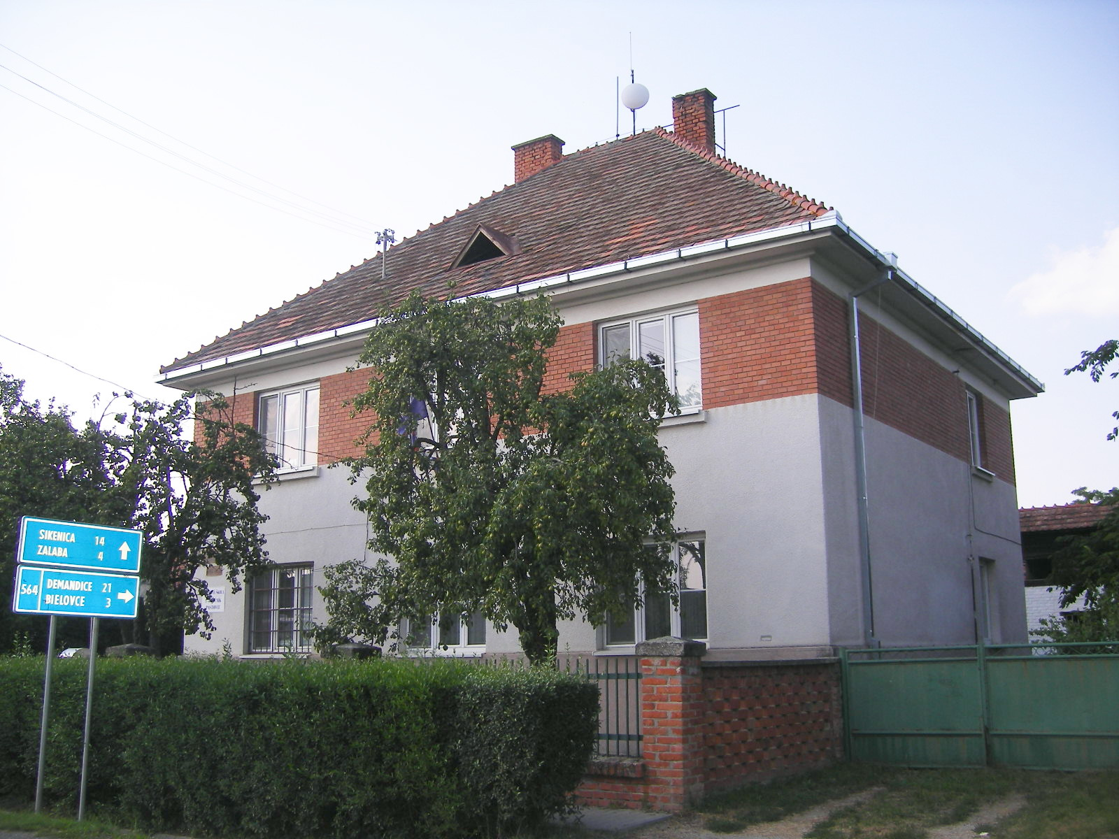 Ipolypásztó - községháza/iskola